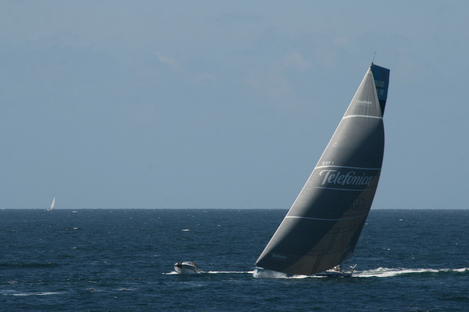 Telefonica durant la Volvo Ocean Race venant de Lorient allant vers les coureaux de Belle-Ile